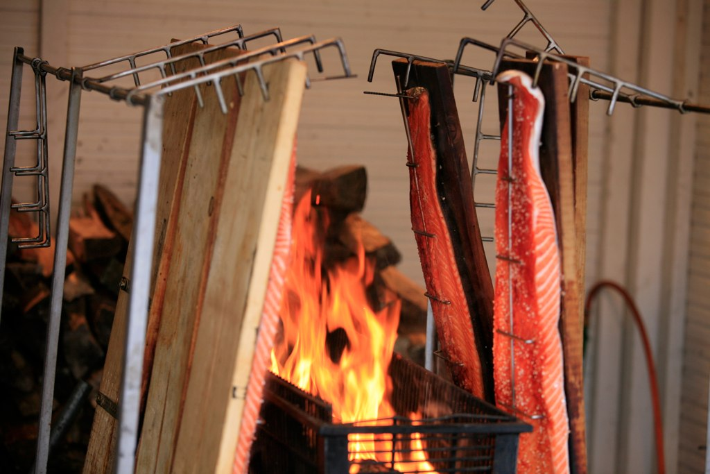 Salmon Steaks